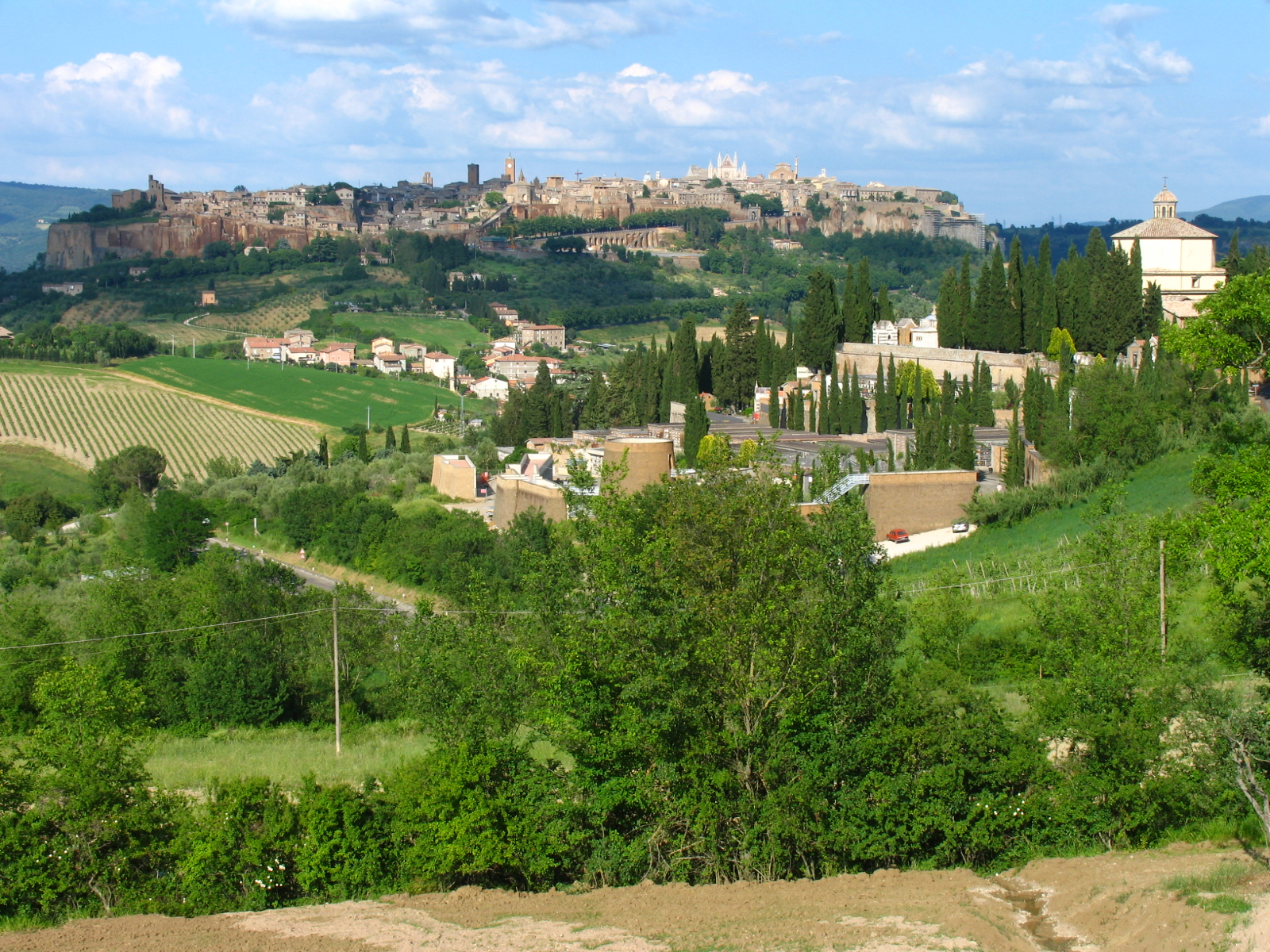 Orvieto, Umbria, ItaliaOrvieto, medieval town